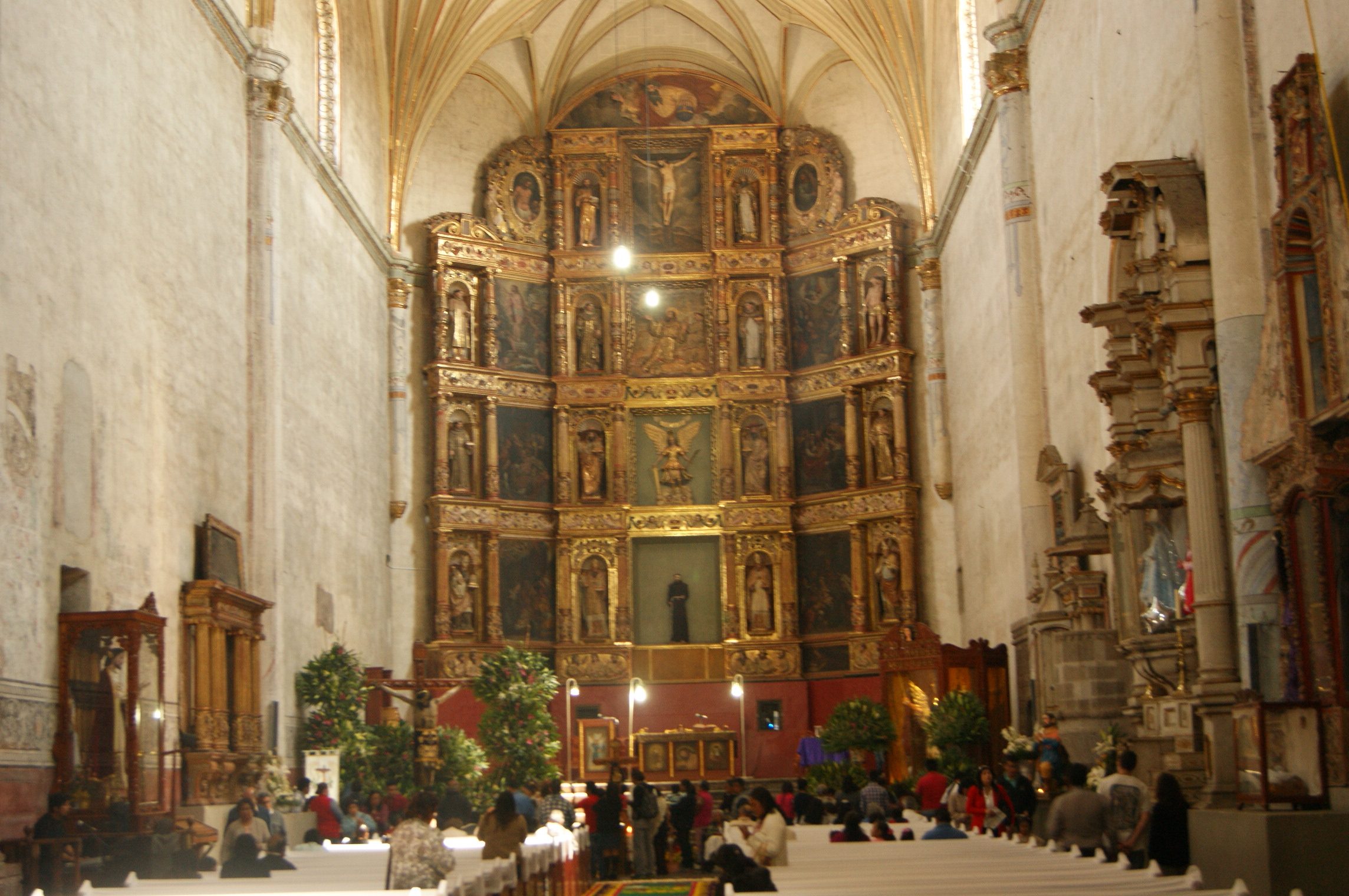 Convento de San Miguel Arcángel en Huejotzingo, Puebla